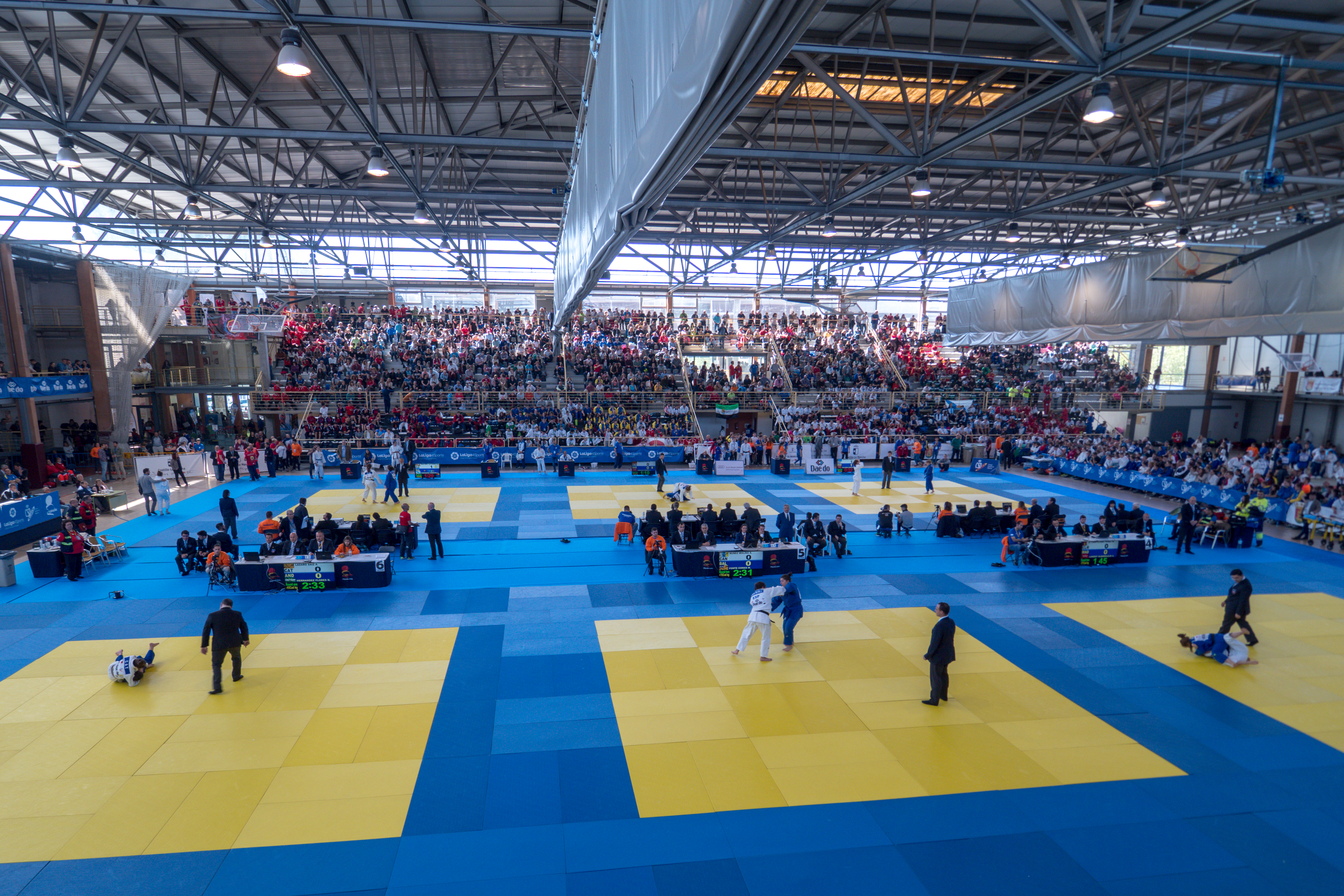 Campeonato de España de Judo en edad escolar en el Complejo Deportivo José Ángel de Jesús Encinas, Talavera de la Reina.